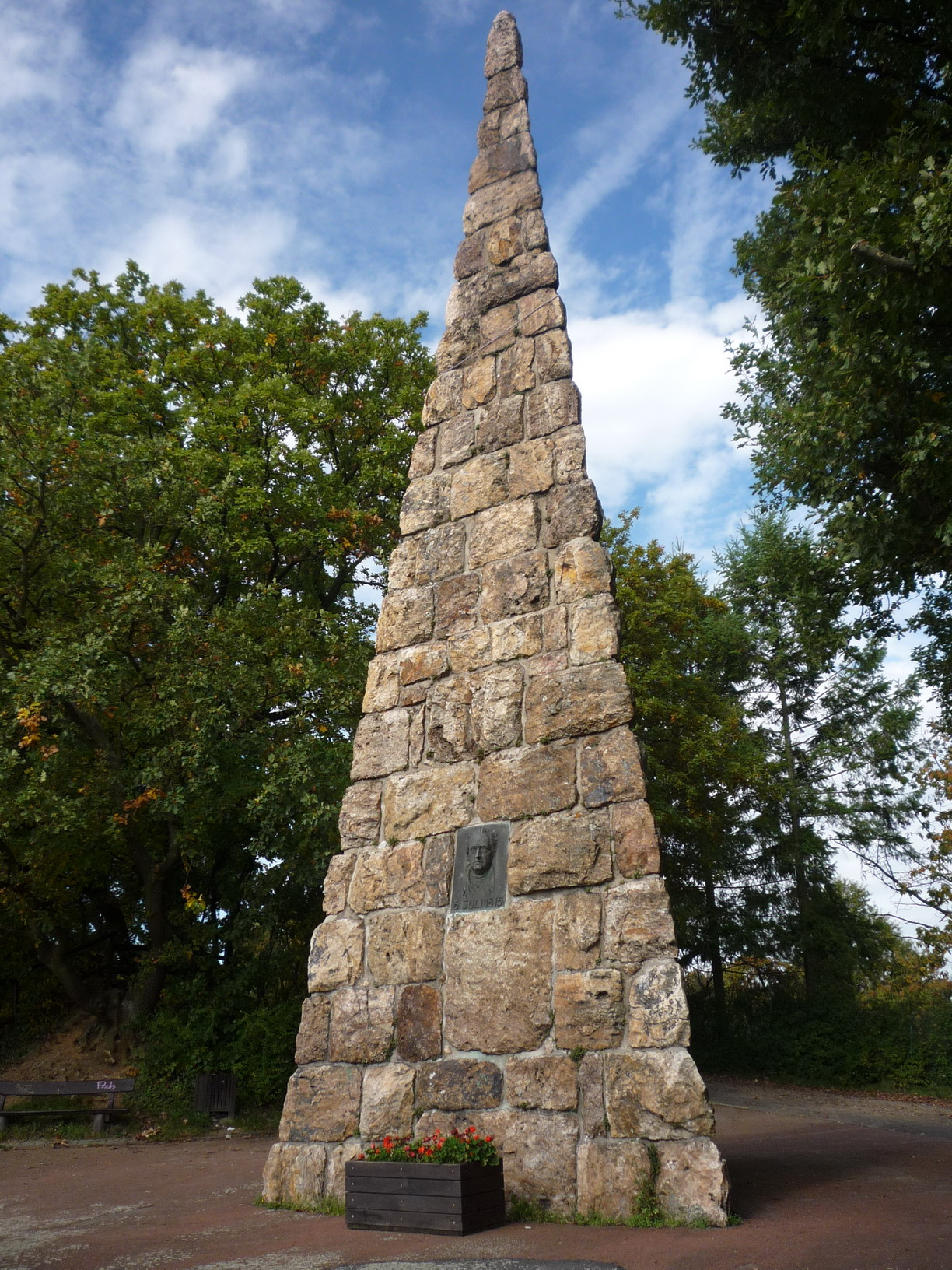 Goethestein in Wiesbaden-Frauenstein auf dem Weg des Rheinsteigs.